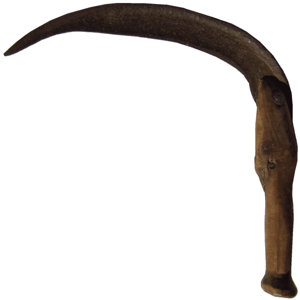 Sigd frå Nordmøre. (Foto: Olve Utne) Sickle frå Nordmøre. (Foto: Olve Utne)